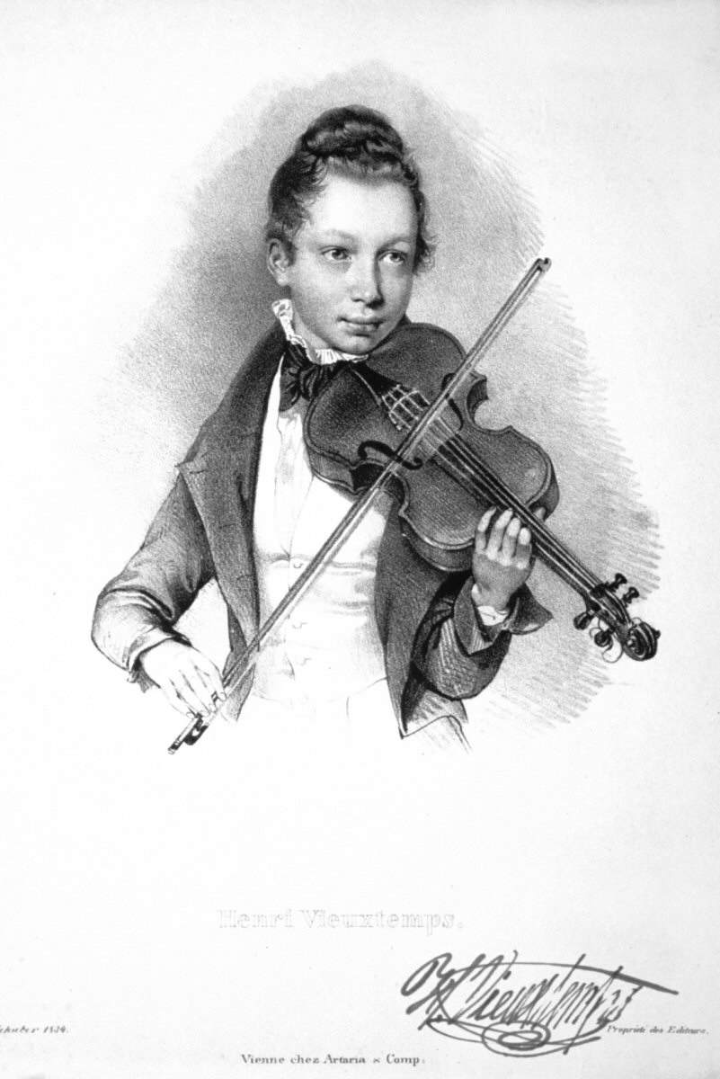 Henri Vieuxtemps, Lithographie von Josef Kriehuber, 1834